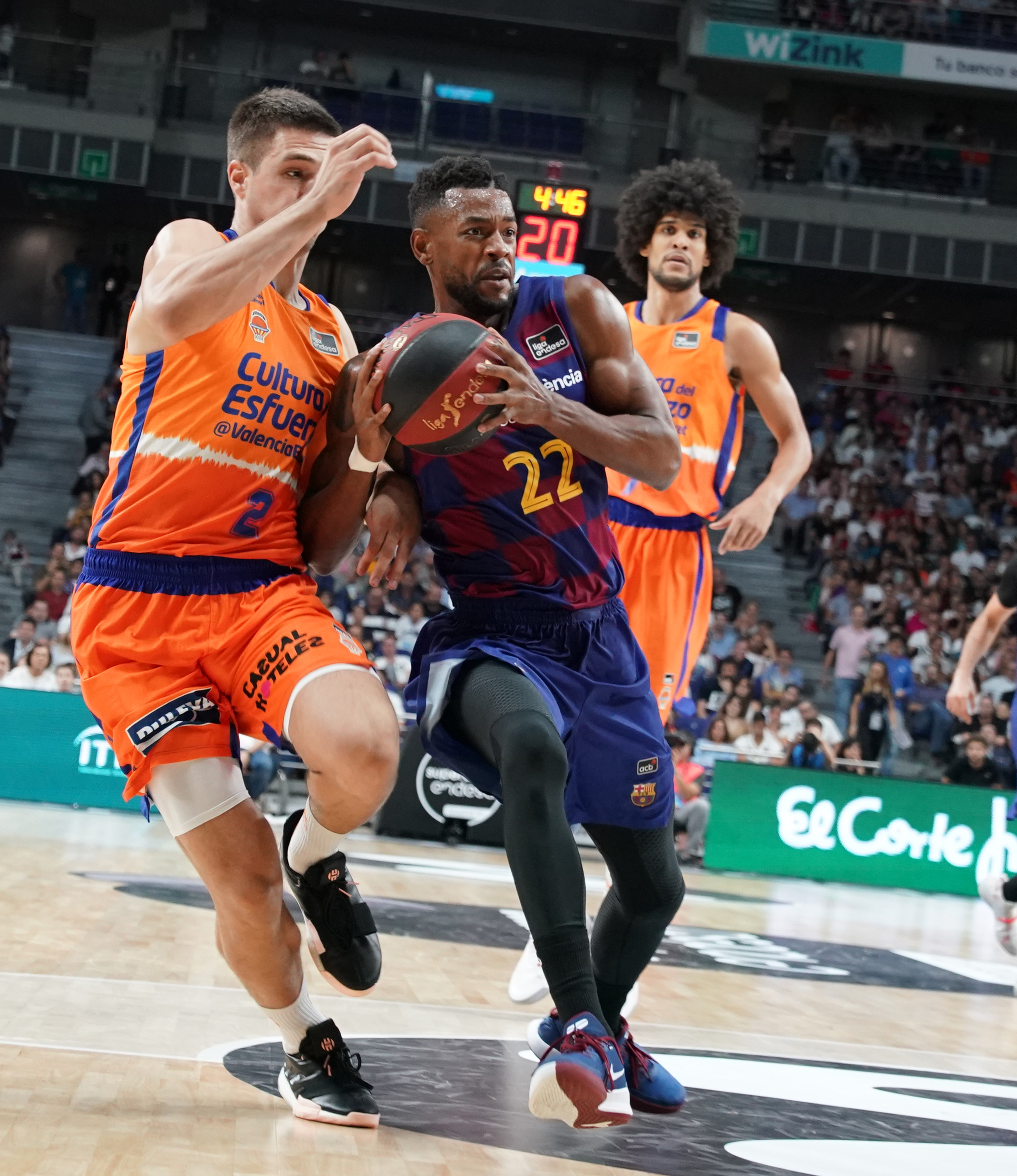 Cory Higgins